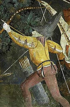 Страсти св. Себастьяна (фрагмент)